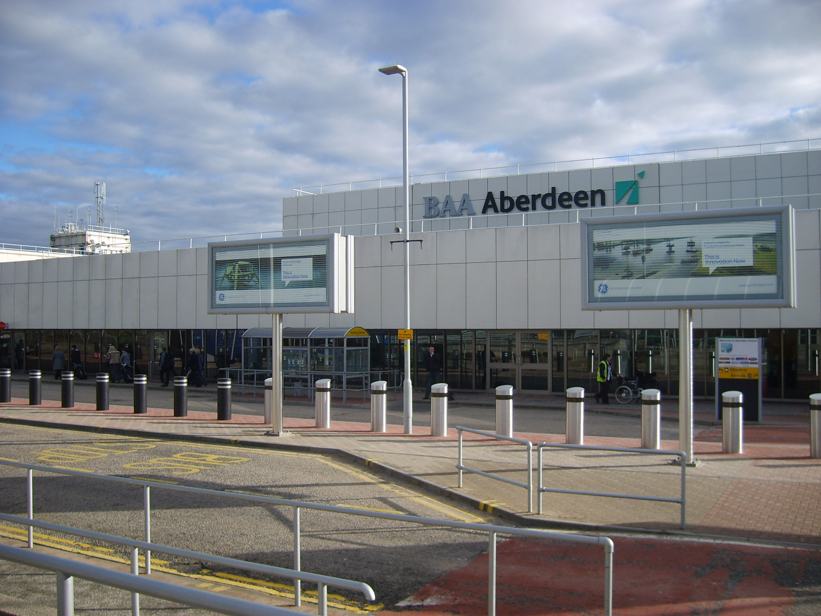 Aberdeen Airport terminal building